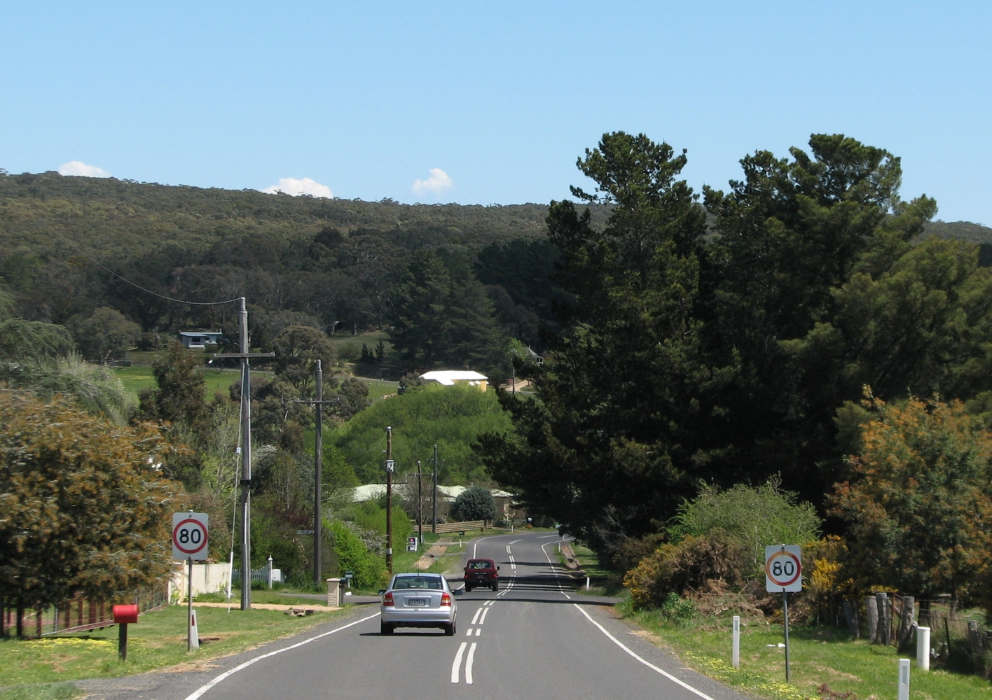 Lauriston, Victoria, Australia